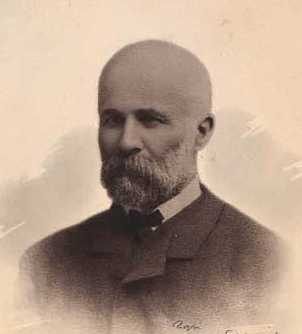 Otto Kalkar (09.Jun.1837-06.Jan.1926), Dansk præst og sprogforsker